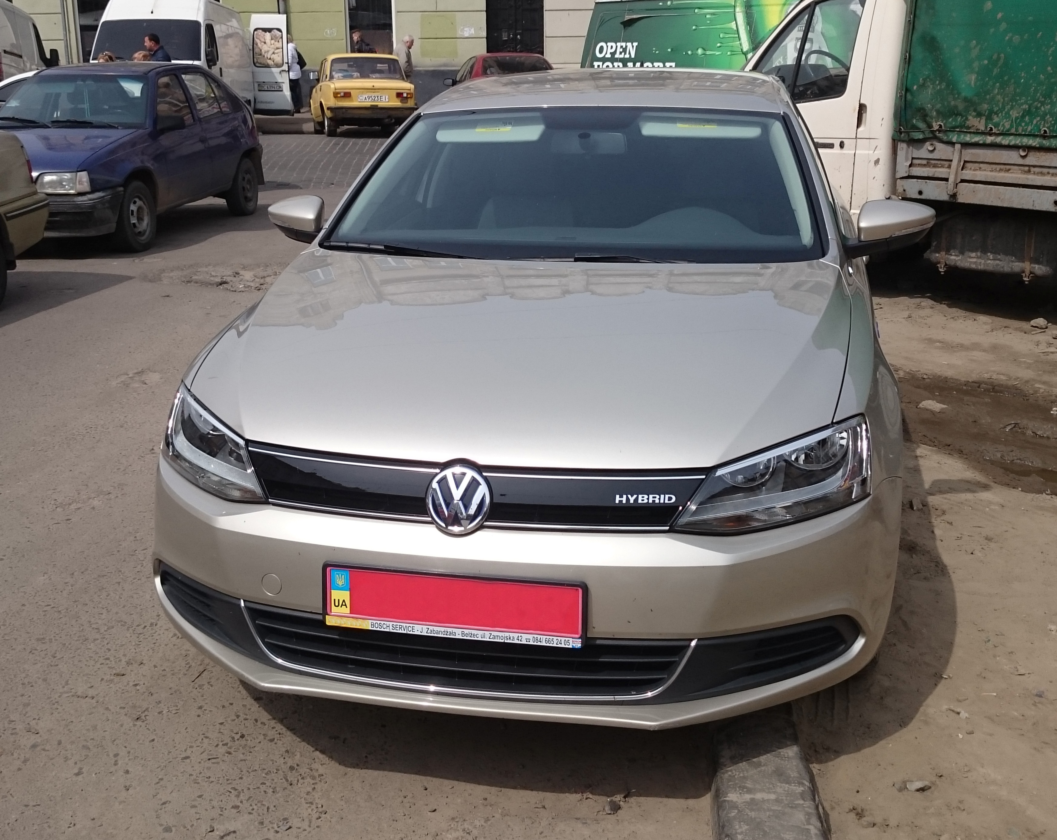 Volkswagen Jetta Hybrid (Type 1B)